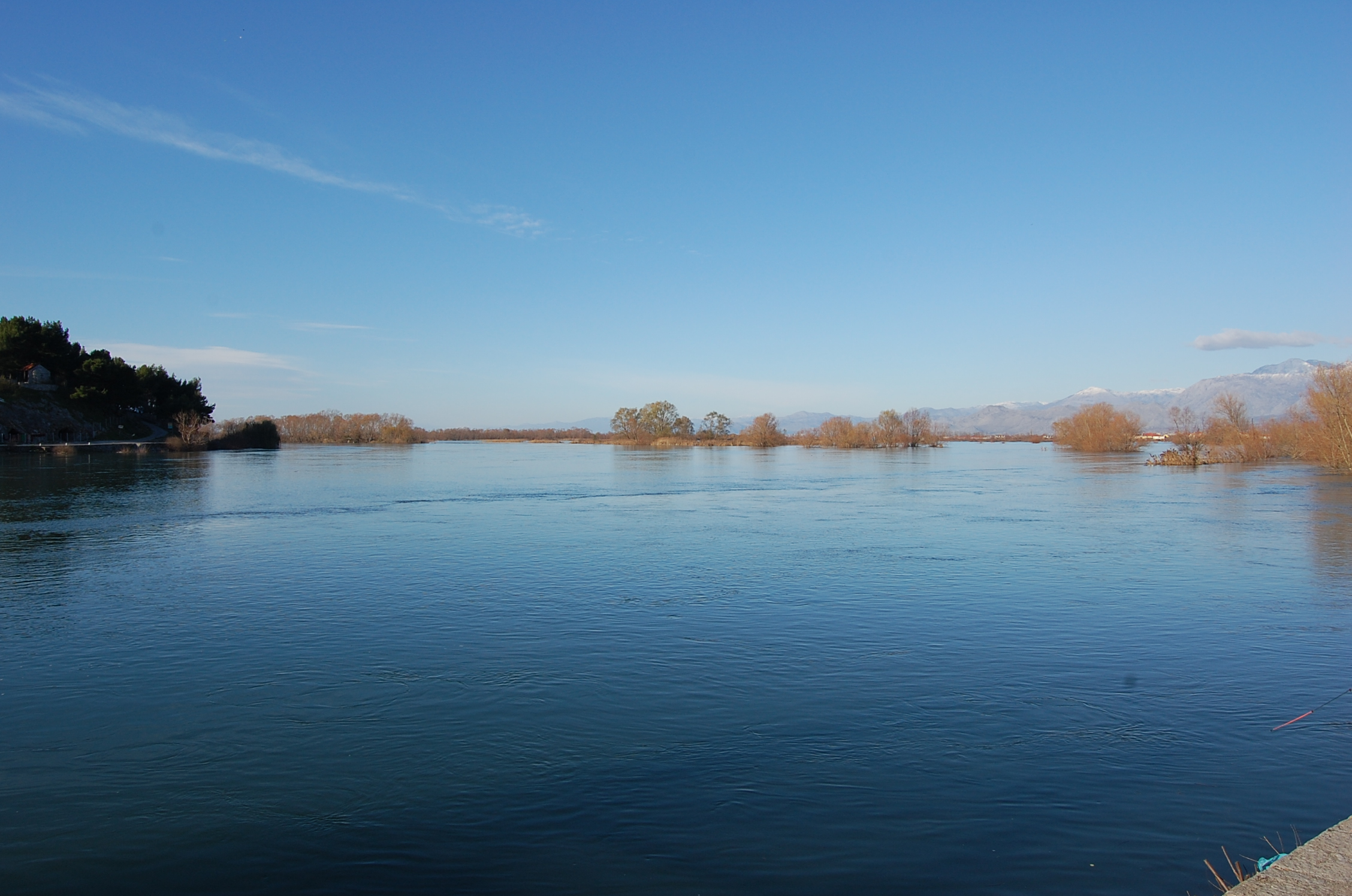 The Buna river in Shkodër, Albania